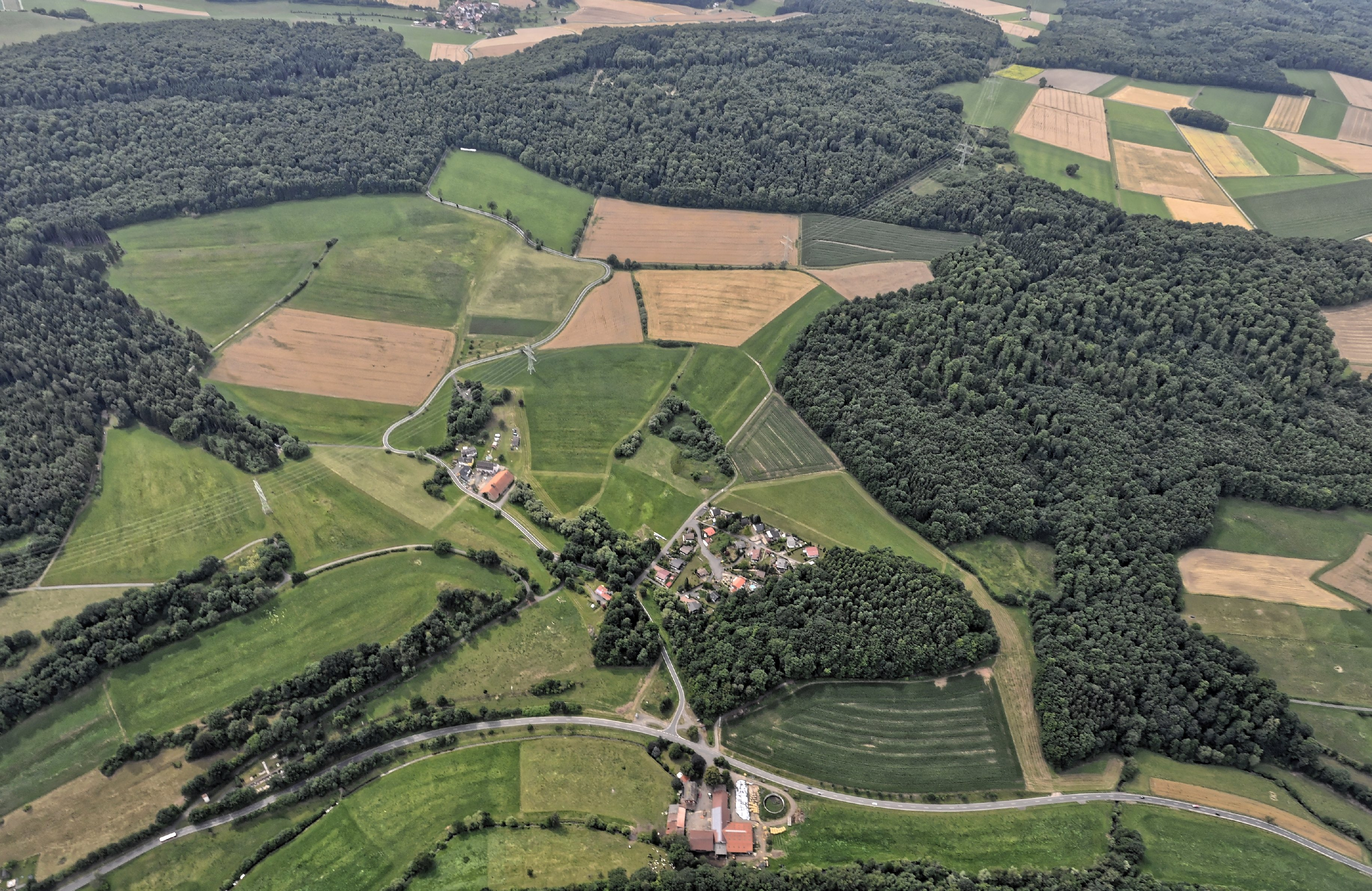 Bilder vom Flug Nordholz-Hammelburg 2015: Die Ulrichsmühle (vorn), Immenhorst (Mitte) und Basfelder Hof (Mitte links), alle in der Gemarkung Völkershain, Gemeinde Knüllwald, Schwalm-Eder-Kreis, Nordhessen.